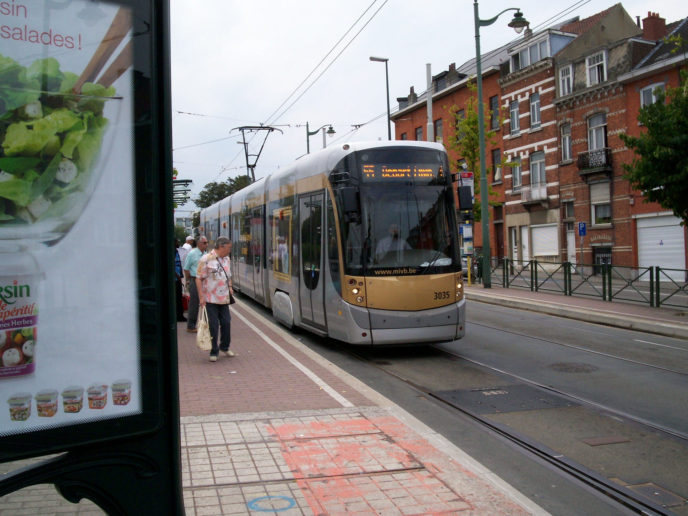 T 3000 de la ligne 55 en station origine de Bordet Station et en direction de Rogier